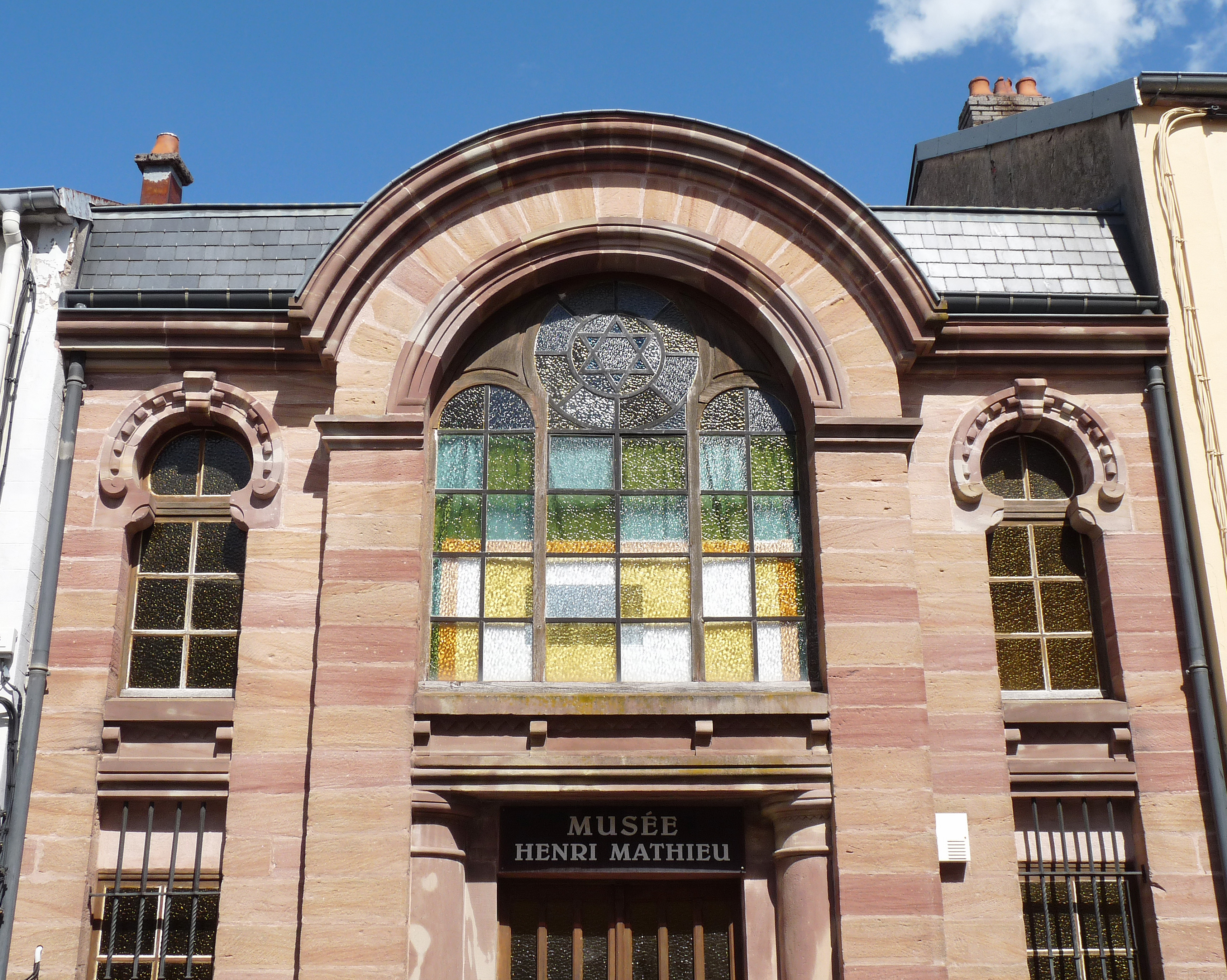 Bruyères (Vosges) : ancienne synagogue, aujourd'hui Musée Henri-Mathieu